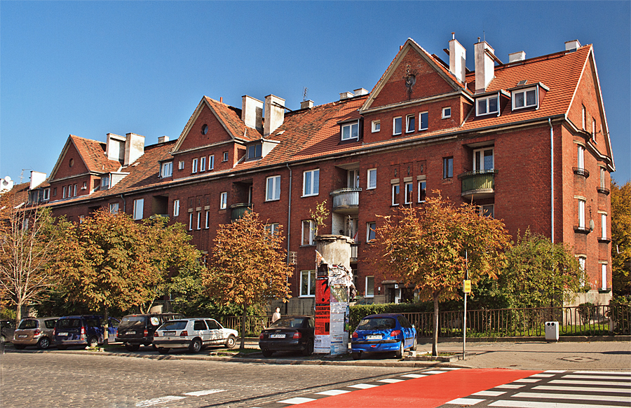 Budynek fundacji Gotthelfa przy alei Pracy we Wrocławiu